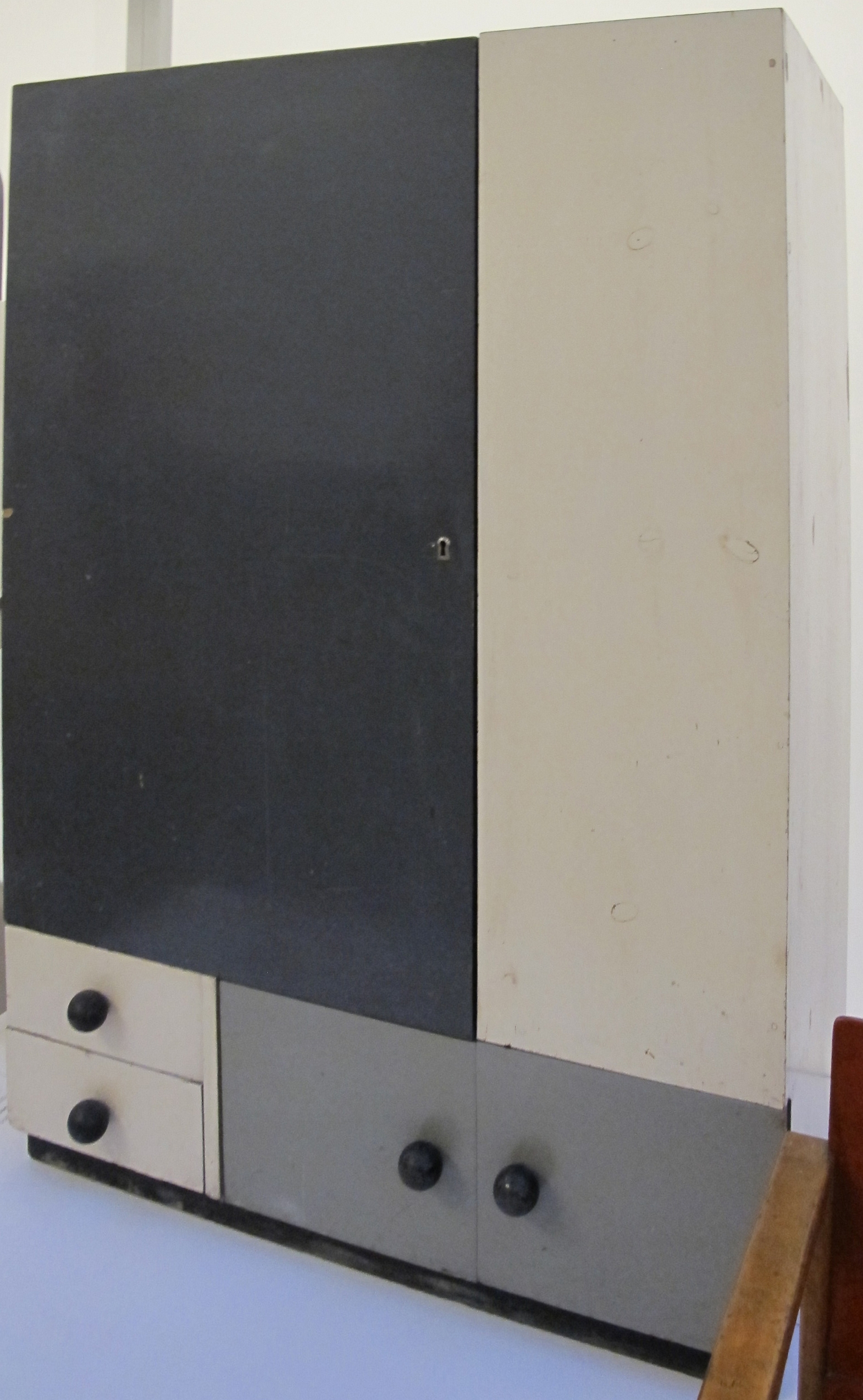 Katt both, armadio per bambini, 1927